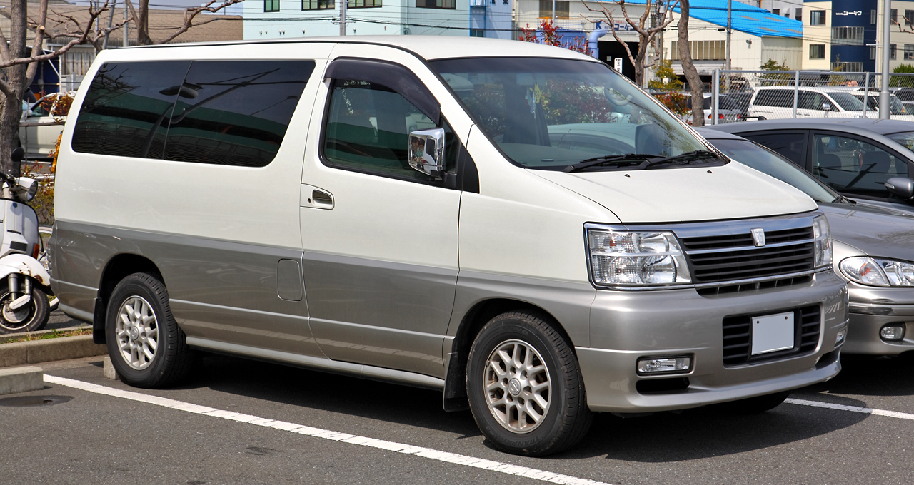 Nissan Elgrand ( APE50 )